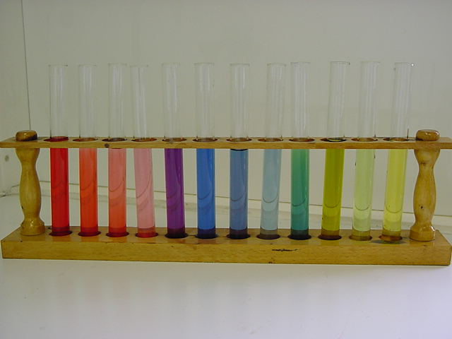 Teintes du jus de chou rouge, selon l'acidité